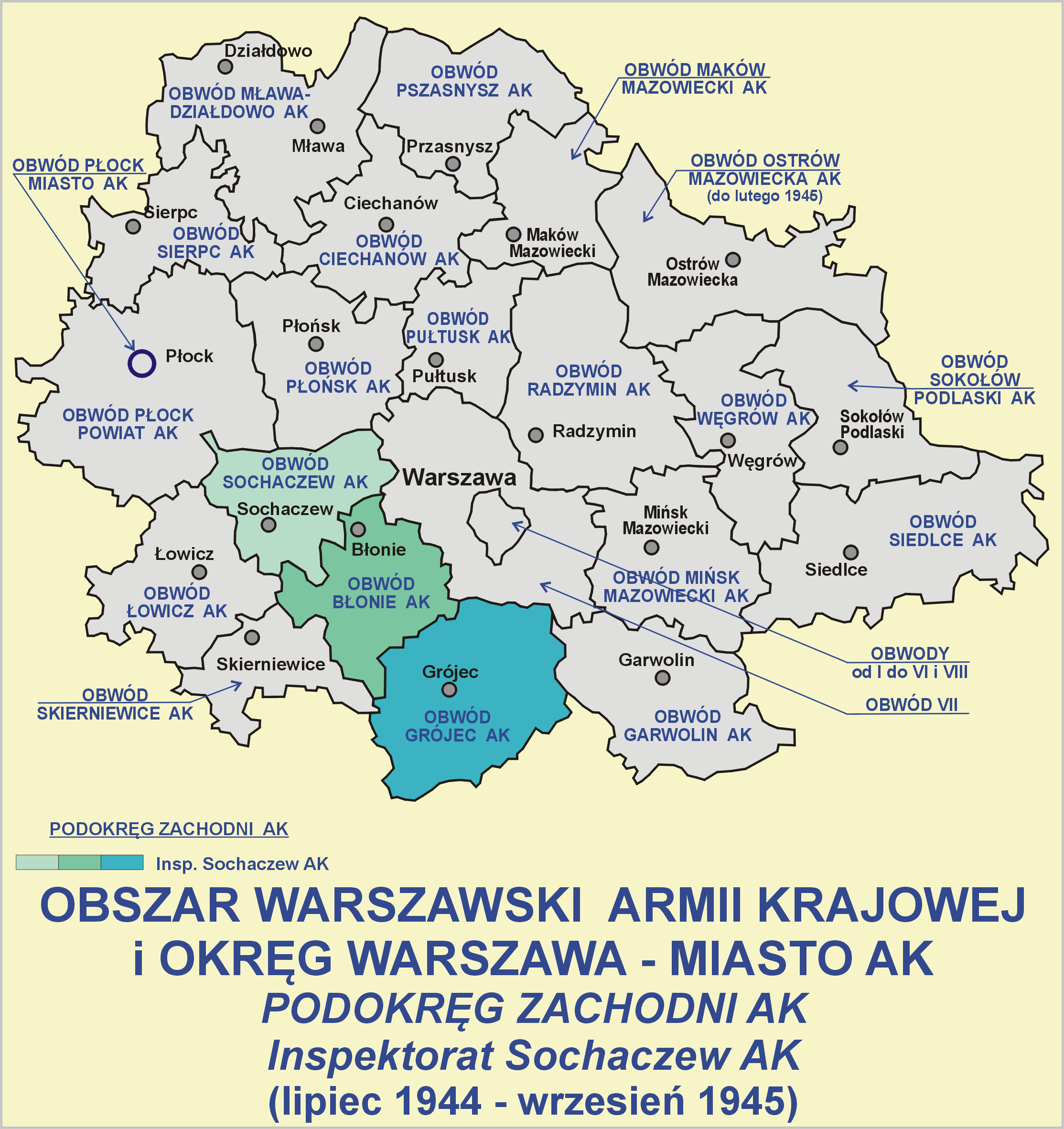 Obszar Warszawa AK i Okręg Warszawa - Miasto AK, Podokręg Zachodni AK - Inspektorat Sochaczew (lipiec 1944 - wrzesień 1945)